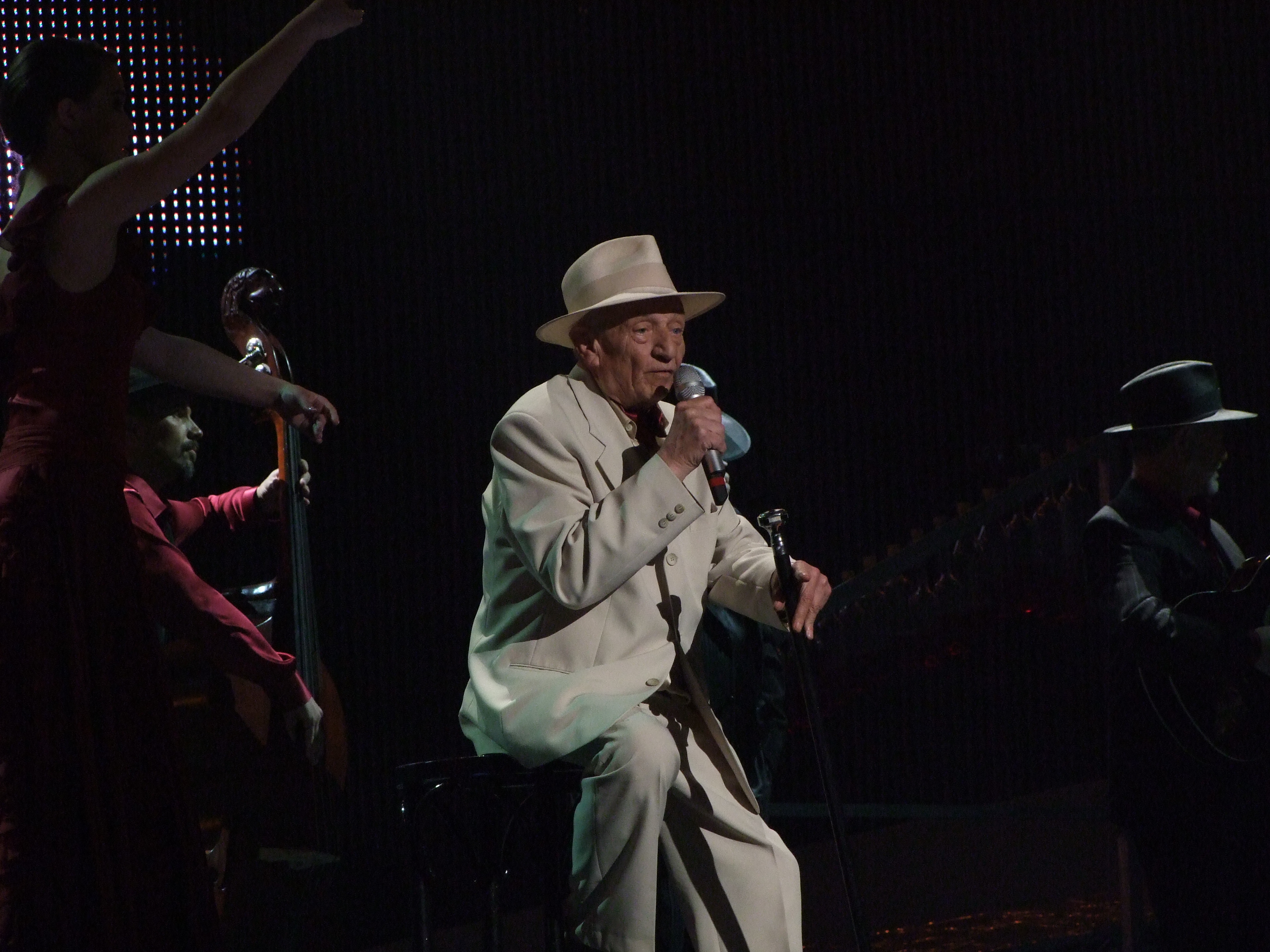 Semifinal 2 Eurovision 2008